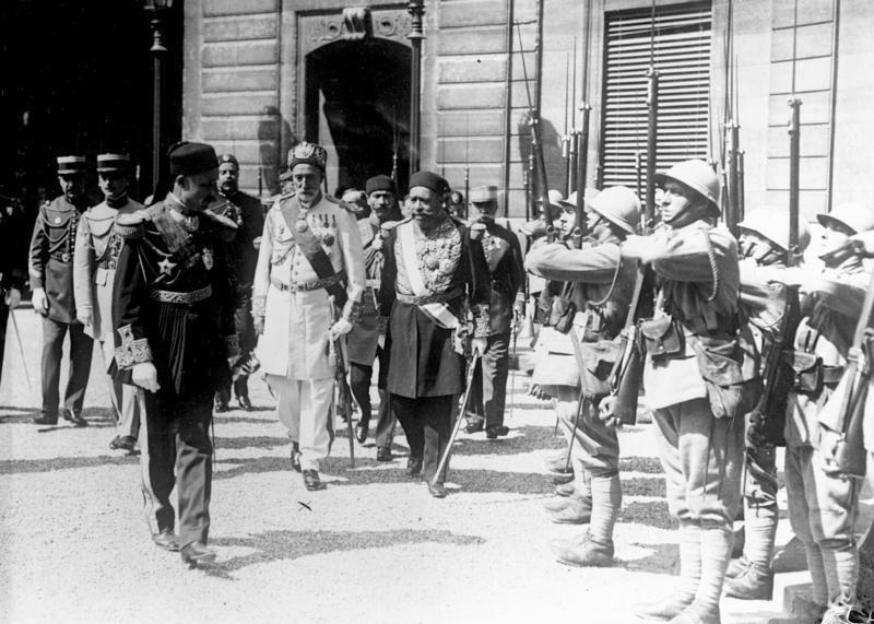 Der Bey von Thunis in Berlin ! Der Bey von Thunis (X) schreitet nach seiner Ankunft in Paris die französische Ehrenwache ab. Information added by Wikimedia users.Visit of Habib Bey, bey of Tunis, in Paris (July 1923)